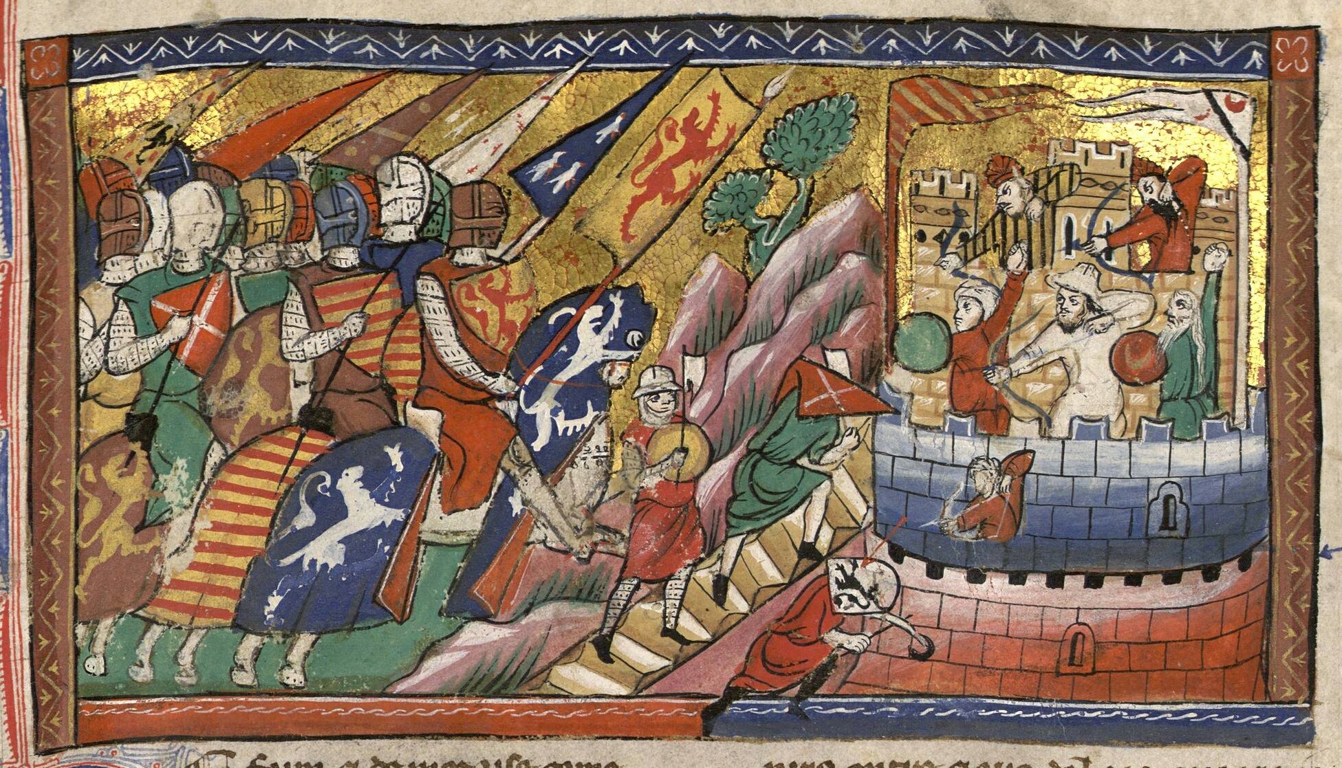 Bataille d'Antioche (1098)